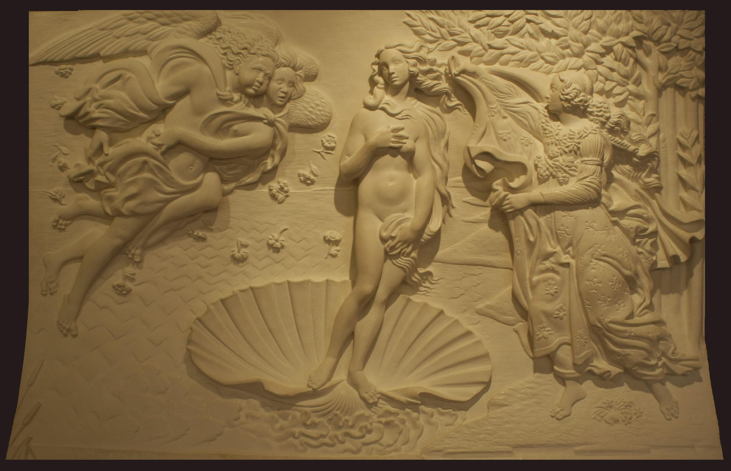 Nascita di Venere - Sandro Botticelli (Bassorilievo prospettico - Museo "Anteros")